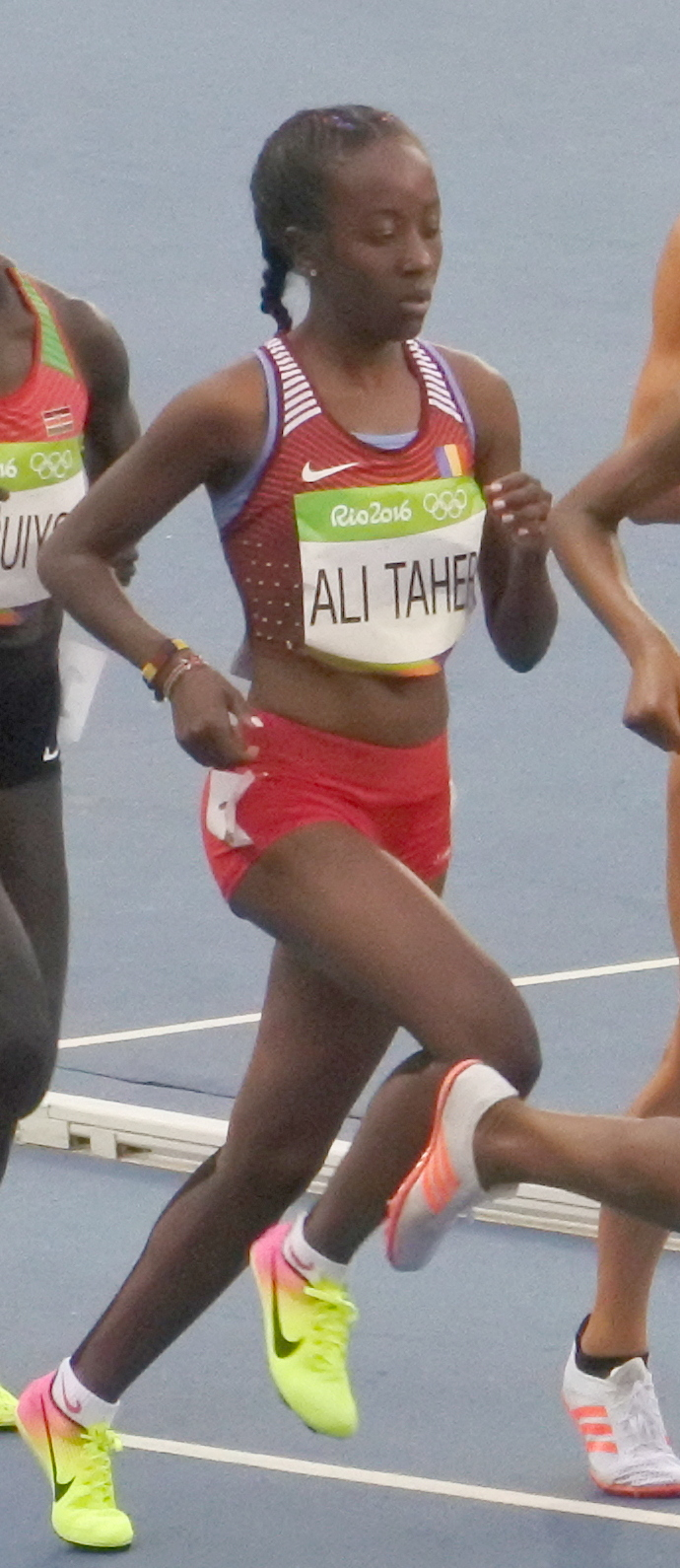 Rio 2016 - Eliminatórias 5000m Feminino